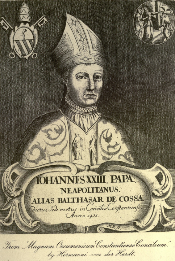 Papež Jan XXIII. v době konání Kostnického koncilu a soudu s mistrem Jan Husem